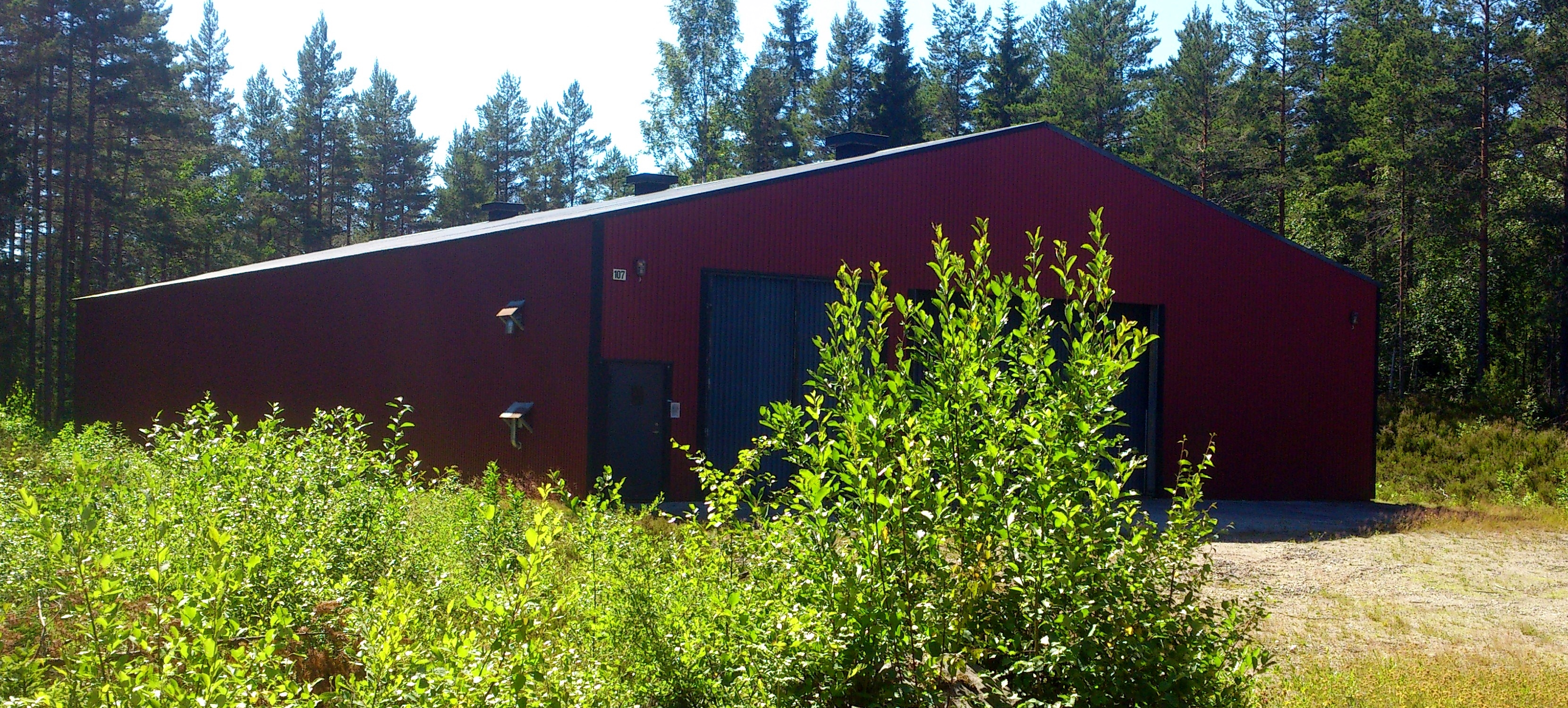 Mobiliseringsförråd någonstans i Sverige